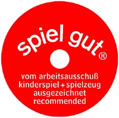 Label spiel gut